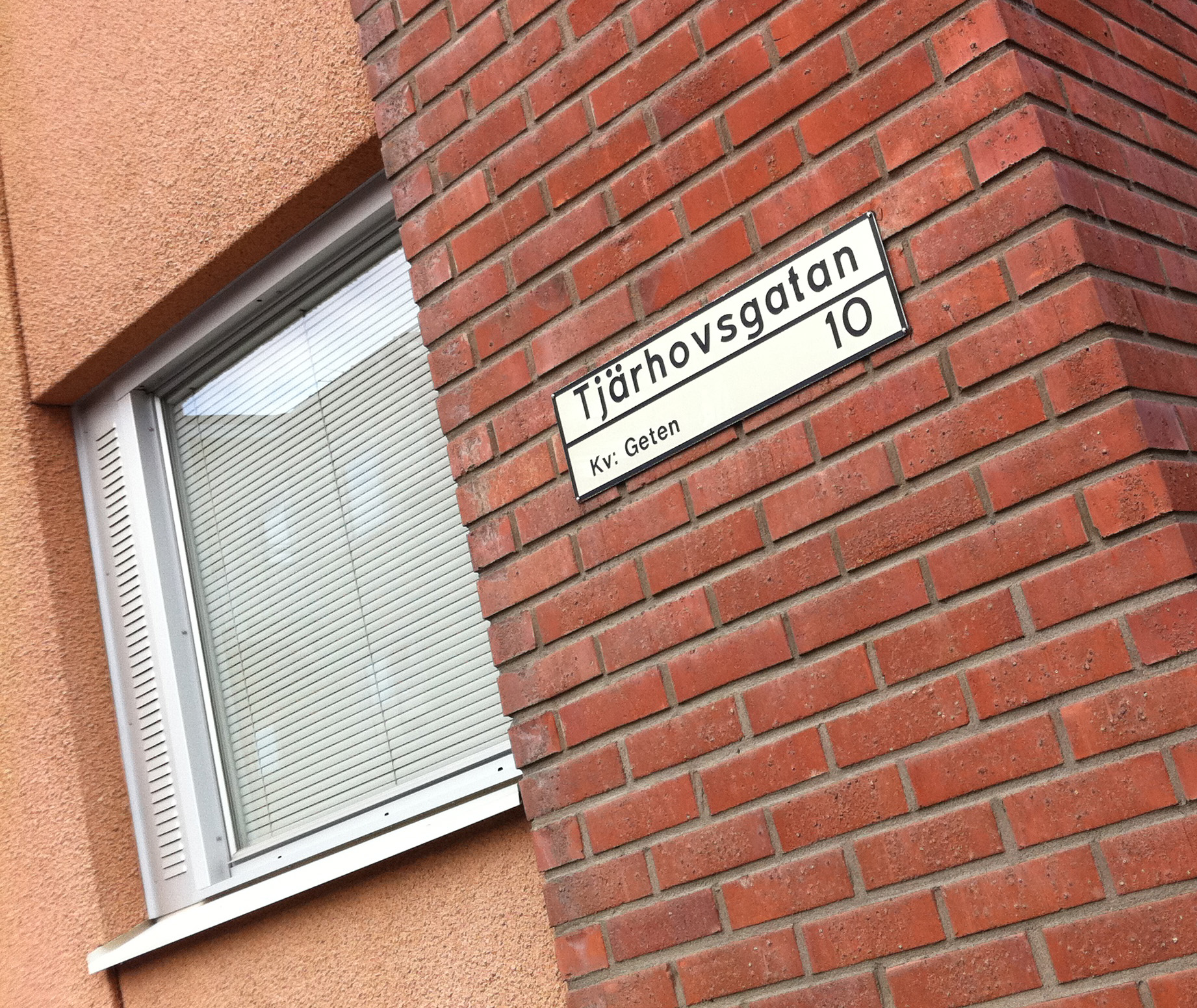 En av få gatuskyltar med kvartersnamn i Skellefteå